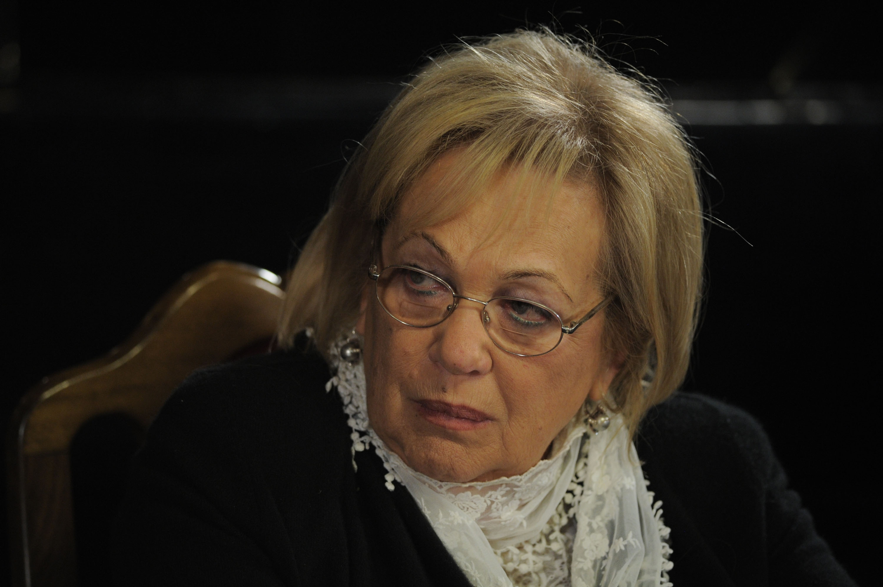 Художественный руководитель московского театра «Современник» Г. Б. Волчек